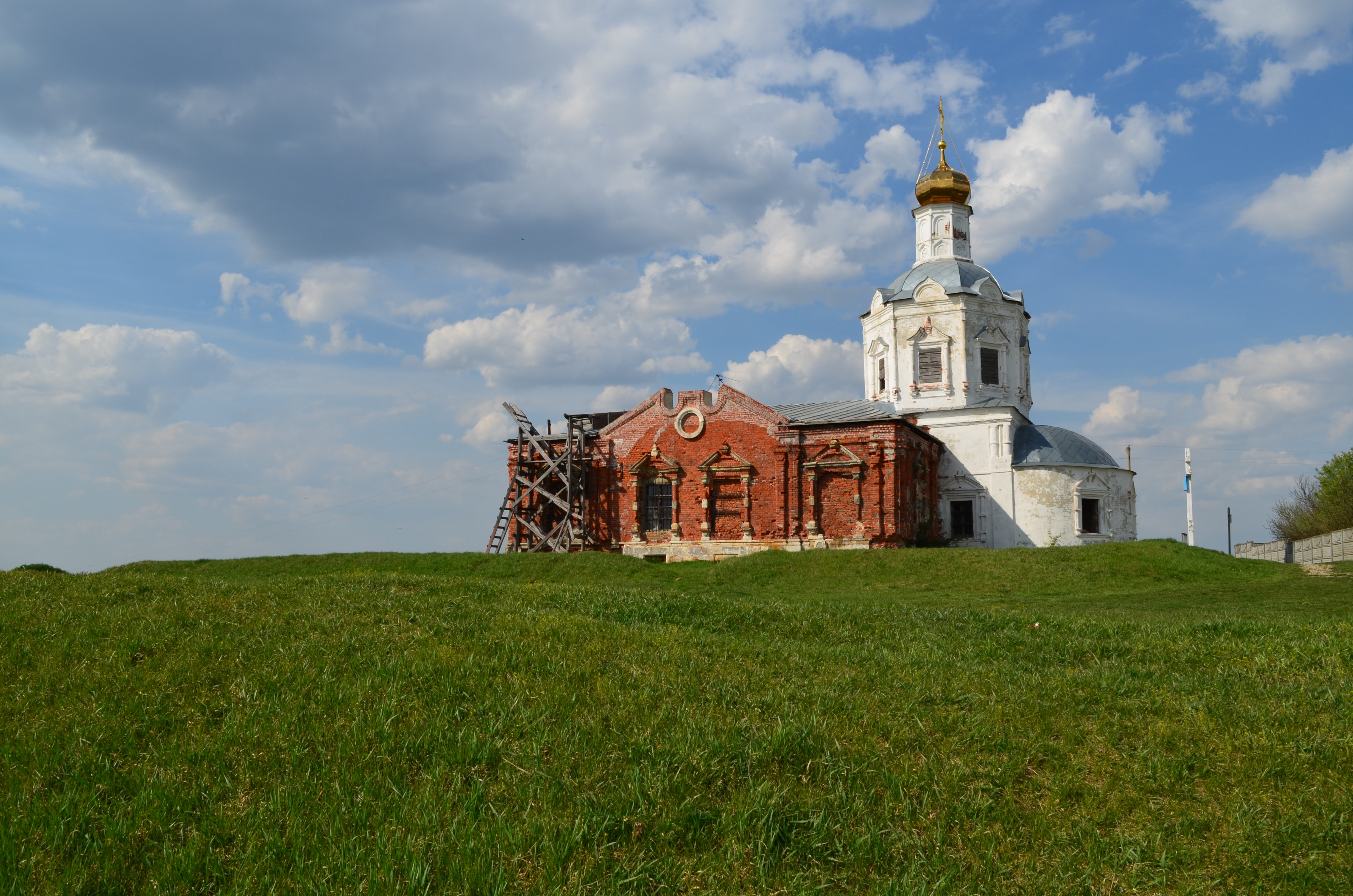 Церковь Успения Пресвятой Богородицы в Глебовом-Городище Рыбновского района Рязанской области.Построена на месте победы русских войск под управлением Дм.Донского над татаро-монголами Золотой Орды в 1378 году,известной как Битва на Воже.